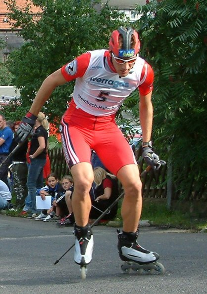 Ronny Ackermann during the Sommer Gand Prix in Steinbach-Hallenberg